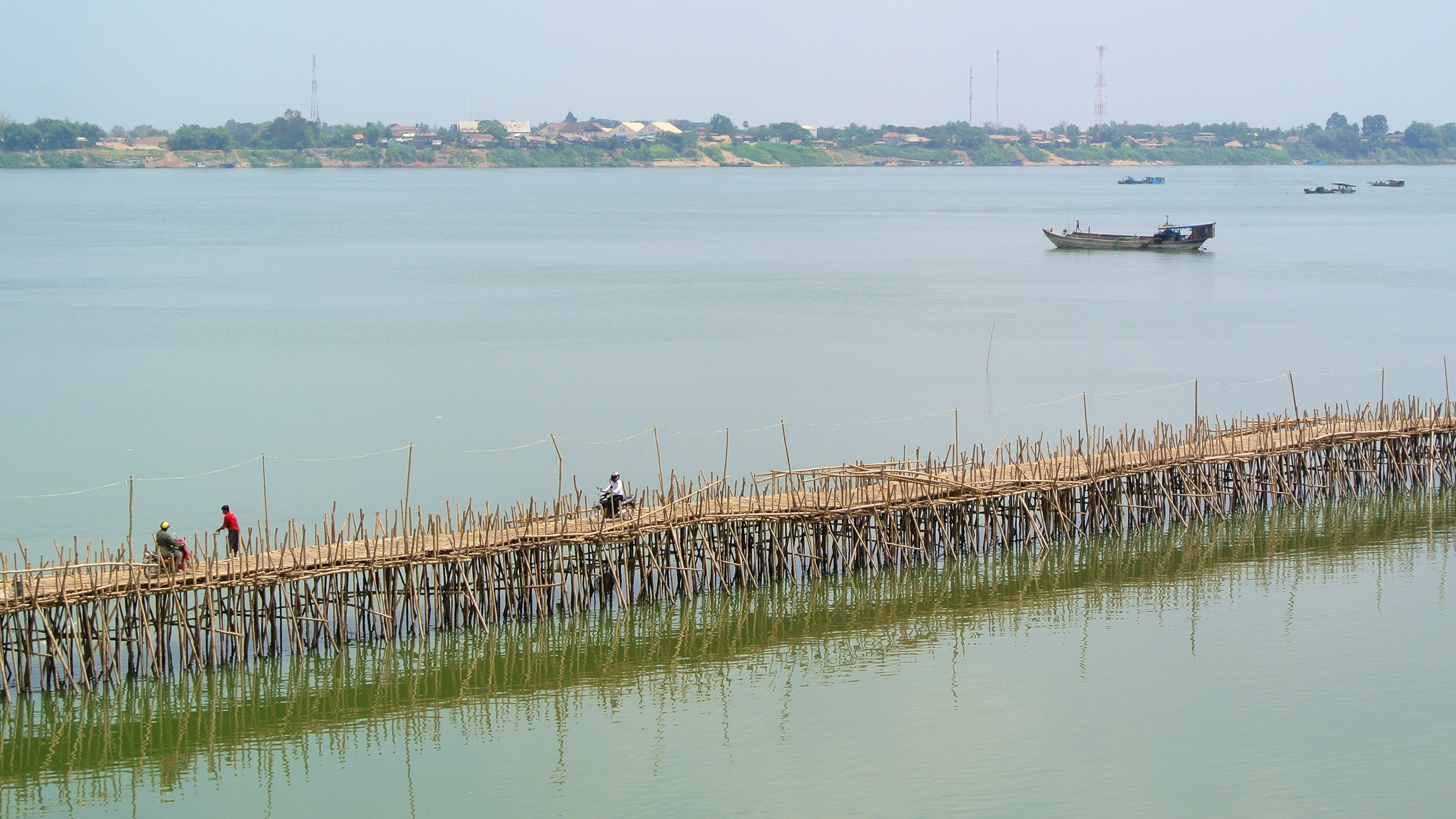 Bamboo bridge to Kaoh Pan